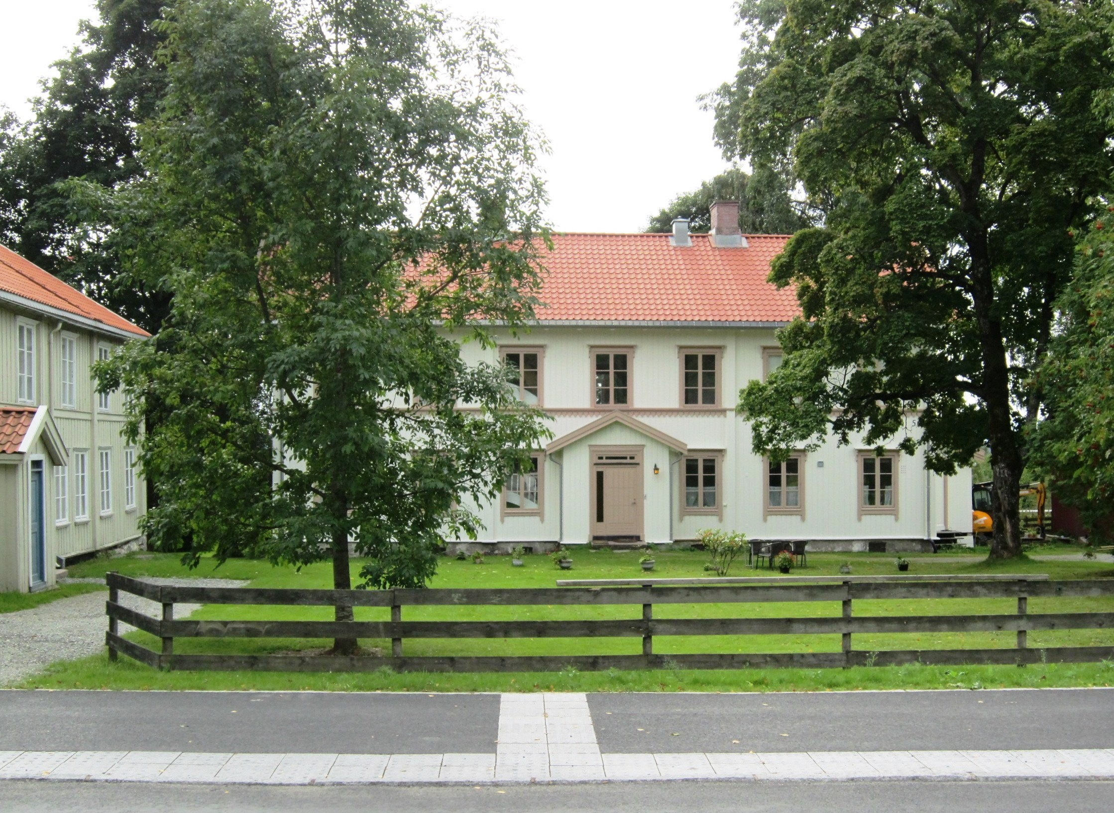 Hovedbygningen ved Skedsmo prestegård